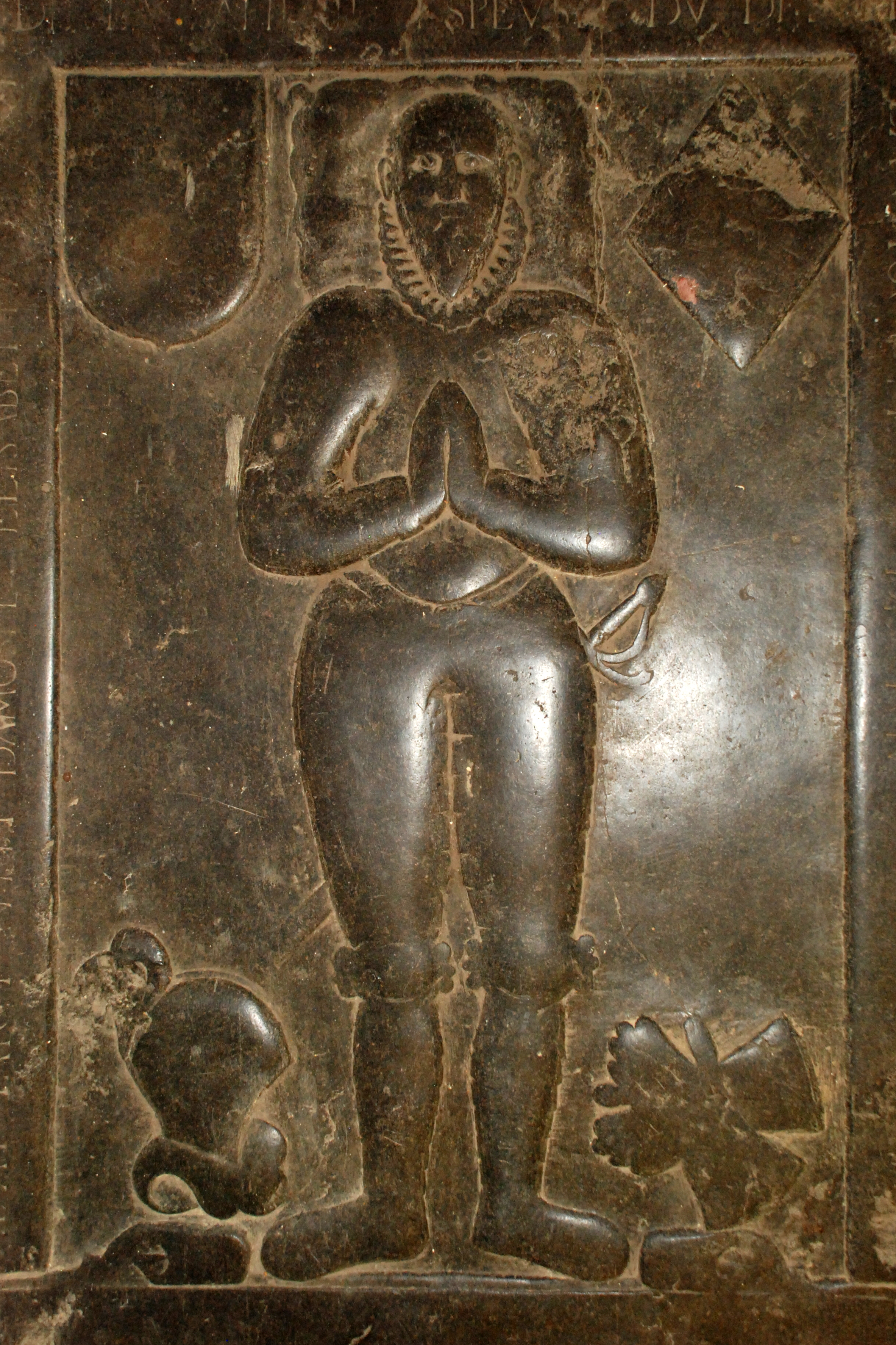 Belgique - Bousval - Église Saint-Barthélemy de Bousval